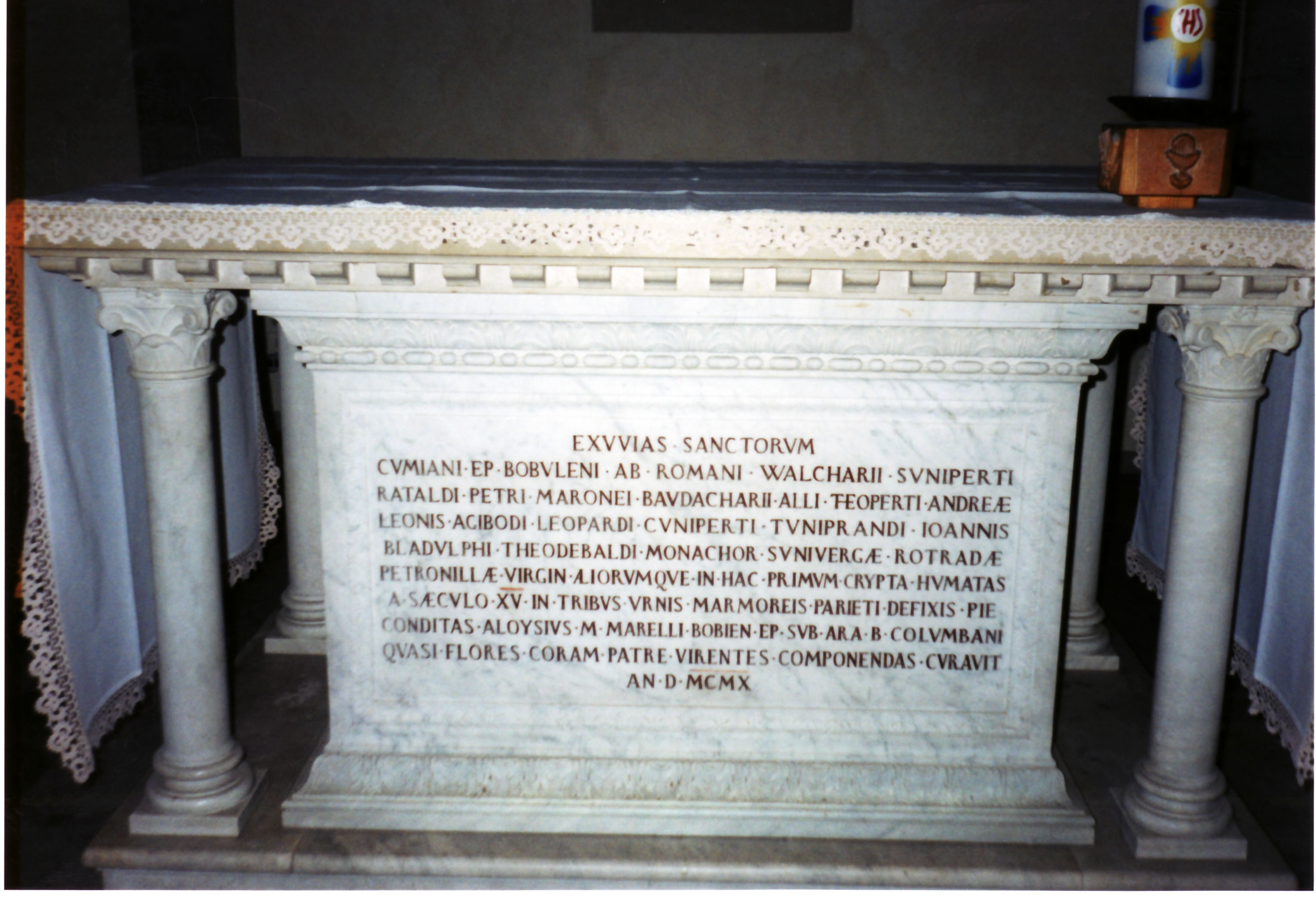 opera propria, foto, Altare sepolcrale nella cripta dell'Abbazia di San Colombano di Bobbio contenente i resti dei 23 santi abati, monaci e monache, licenza libera